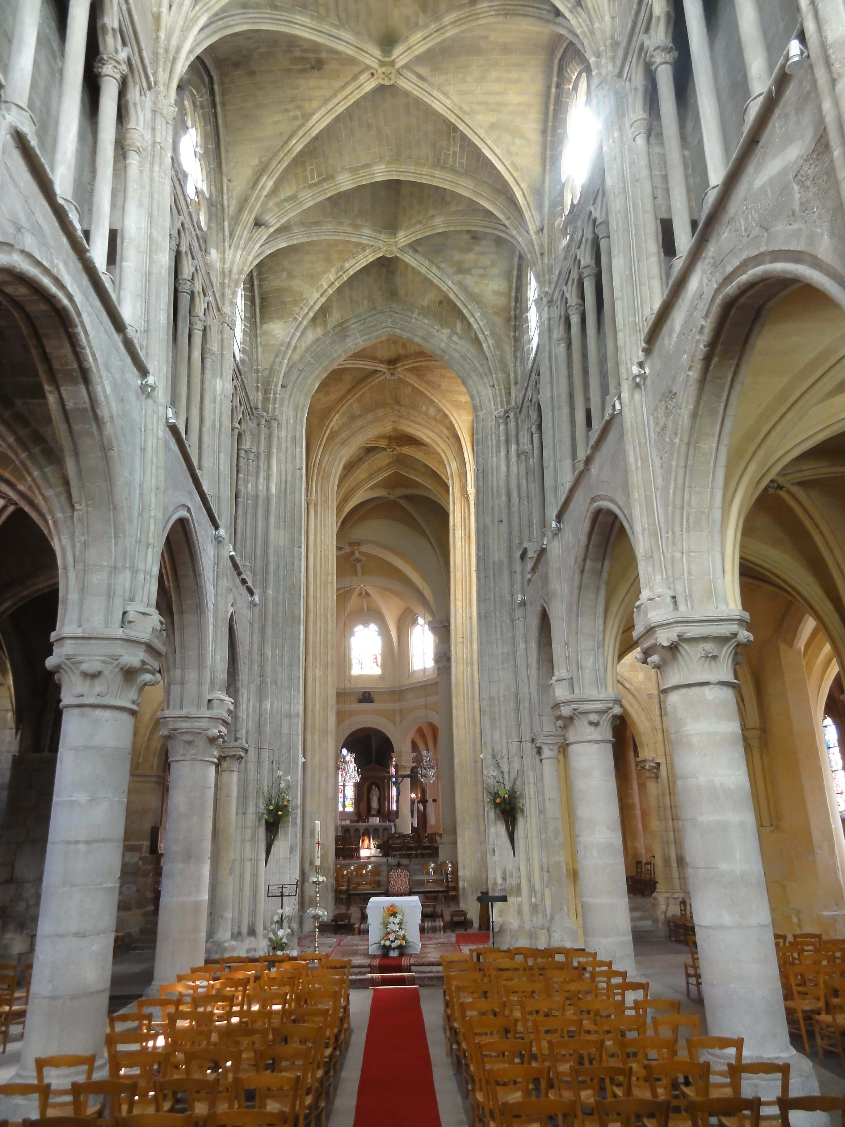 Intérieur de l'église - voir titre.